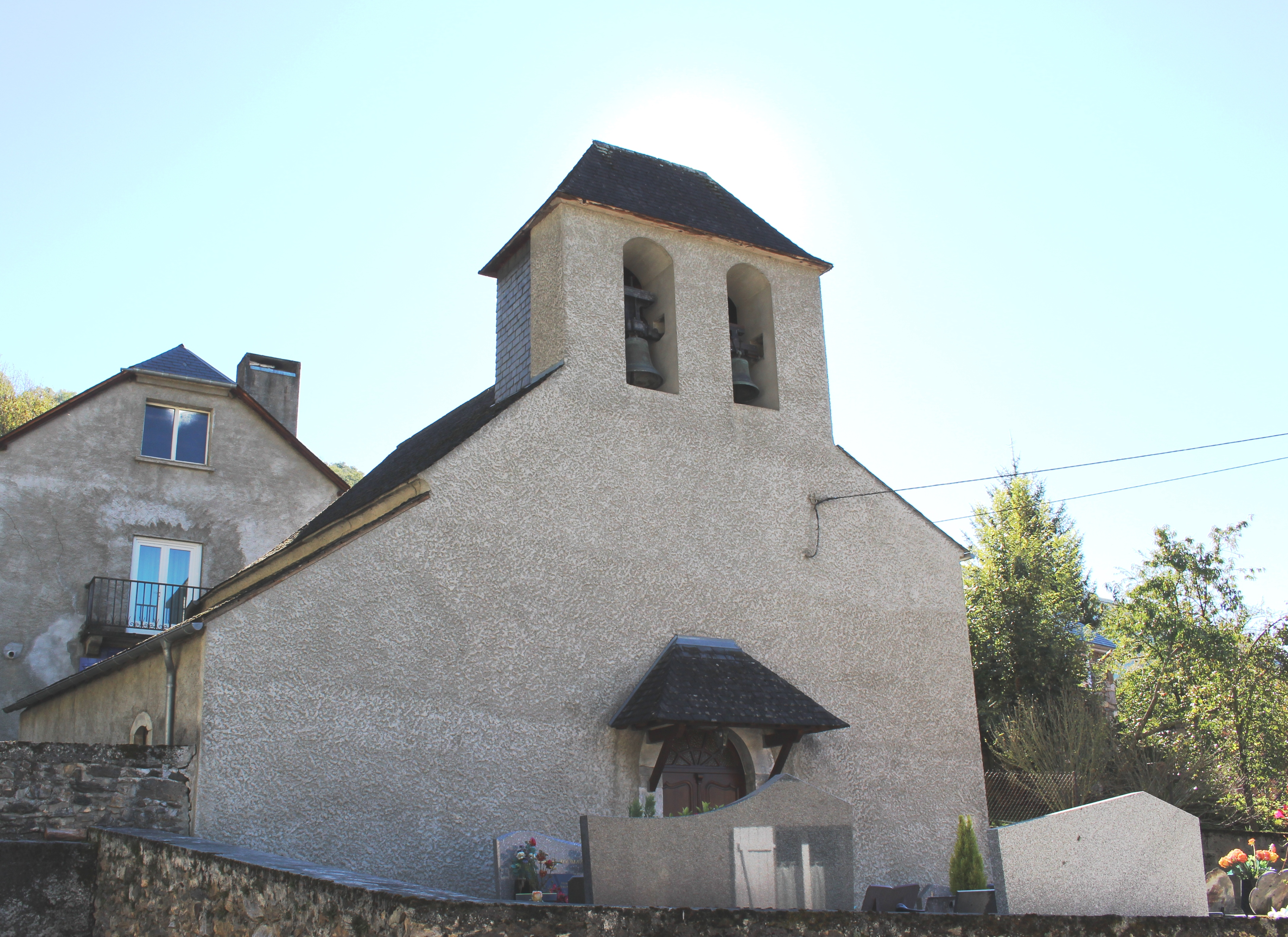 Église Saint-Michel de Souin (Hautes-Pyrénées)